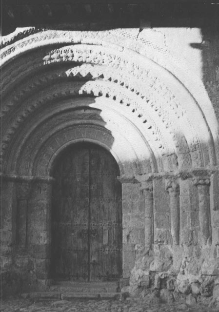 Iglesia. Portada - Trigueros del Valle (Valladolid) - Fotografía 80 x 110 B/N